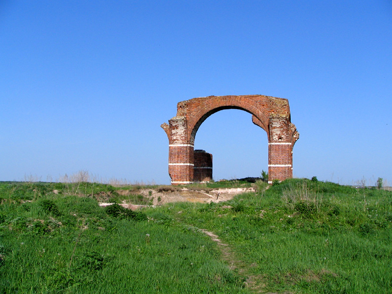 Собор Бориса и Глеба на городище Старая Рязань